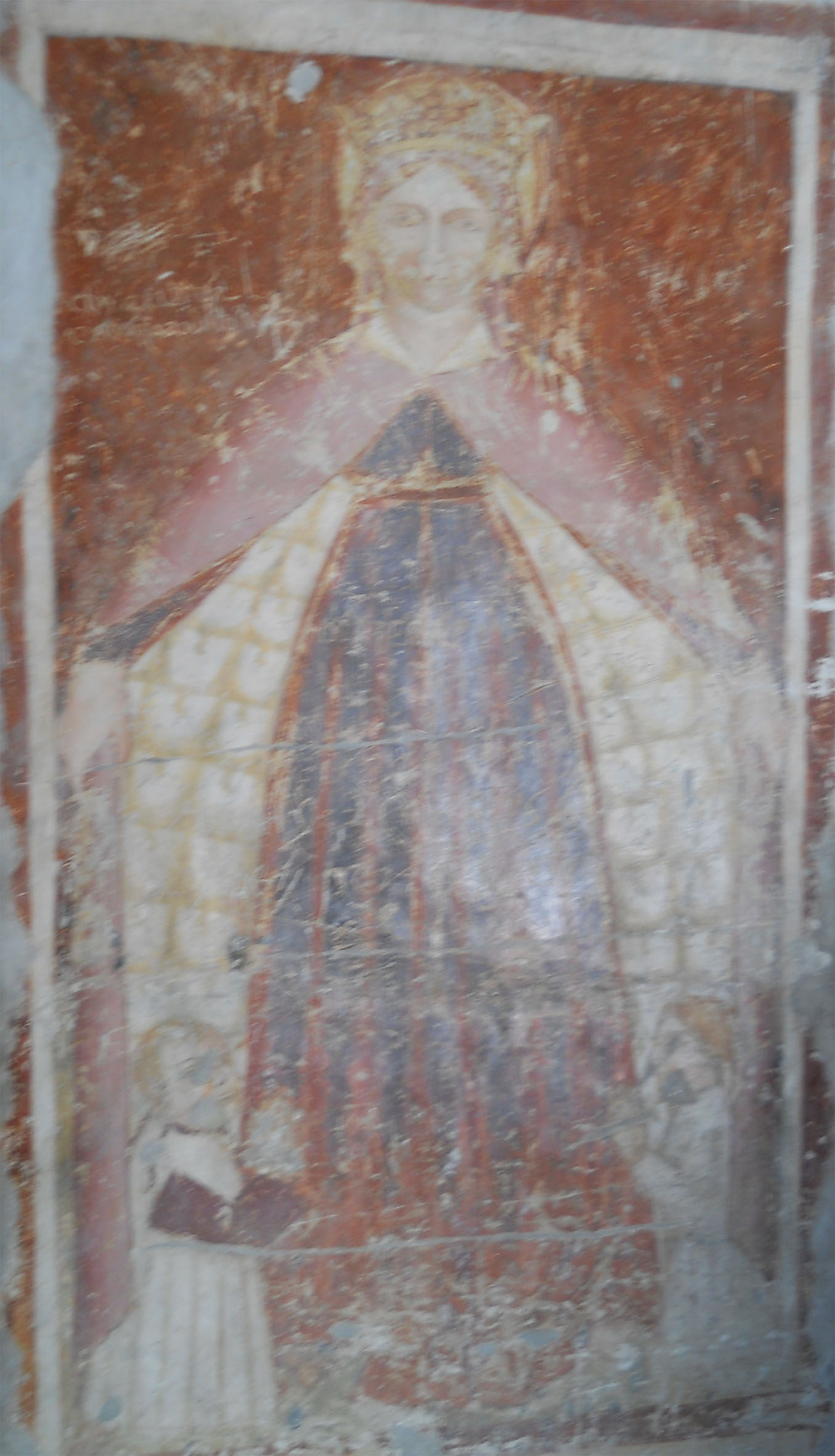 Affresco raffigurante la Madonna della Misericordia su una colonna della pieve di San Giorgio di Valpolicella